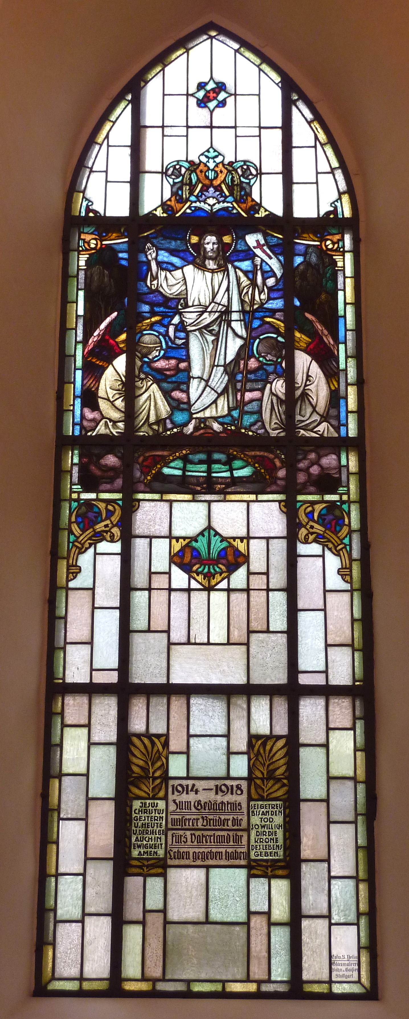 Bleiglasfenster in der St. Leonhardskirche in Knittlingen